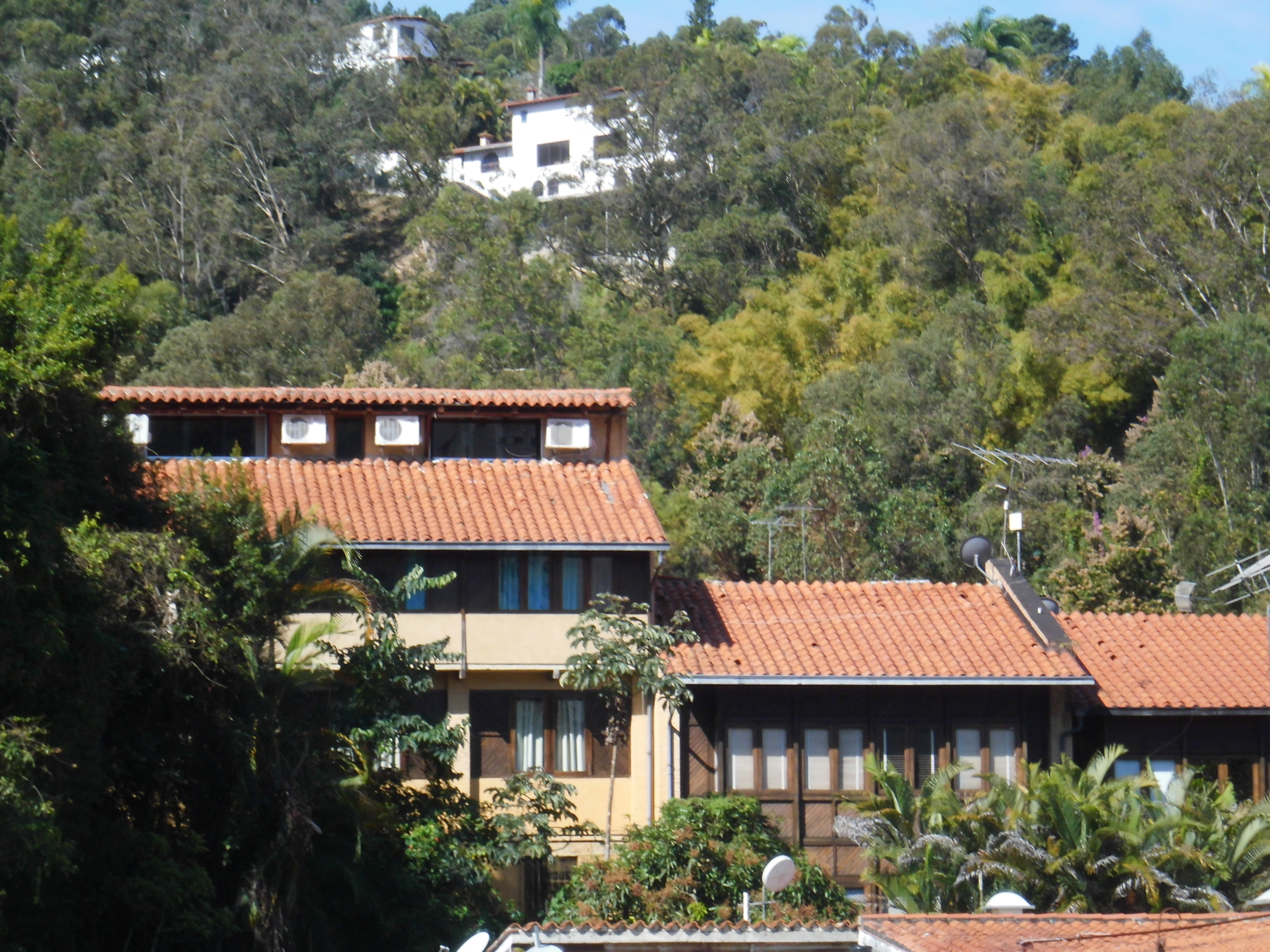 La Boyera municipio El Hatillo, estado Miranda - Venezuela